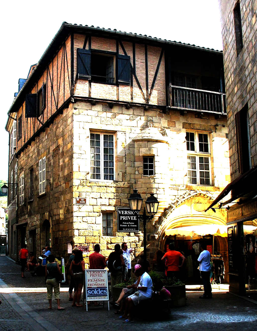 Maison médiévale "Hôtel d' Auglanat" 4600 FIGEAC FRANCE